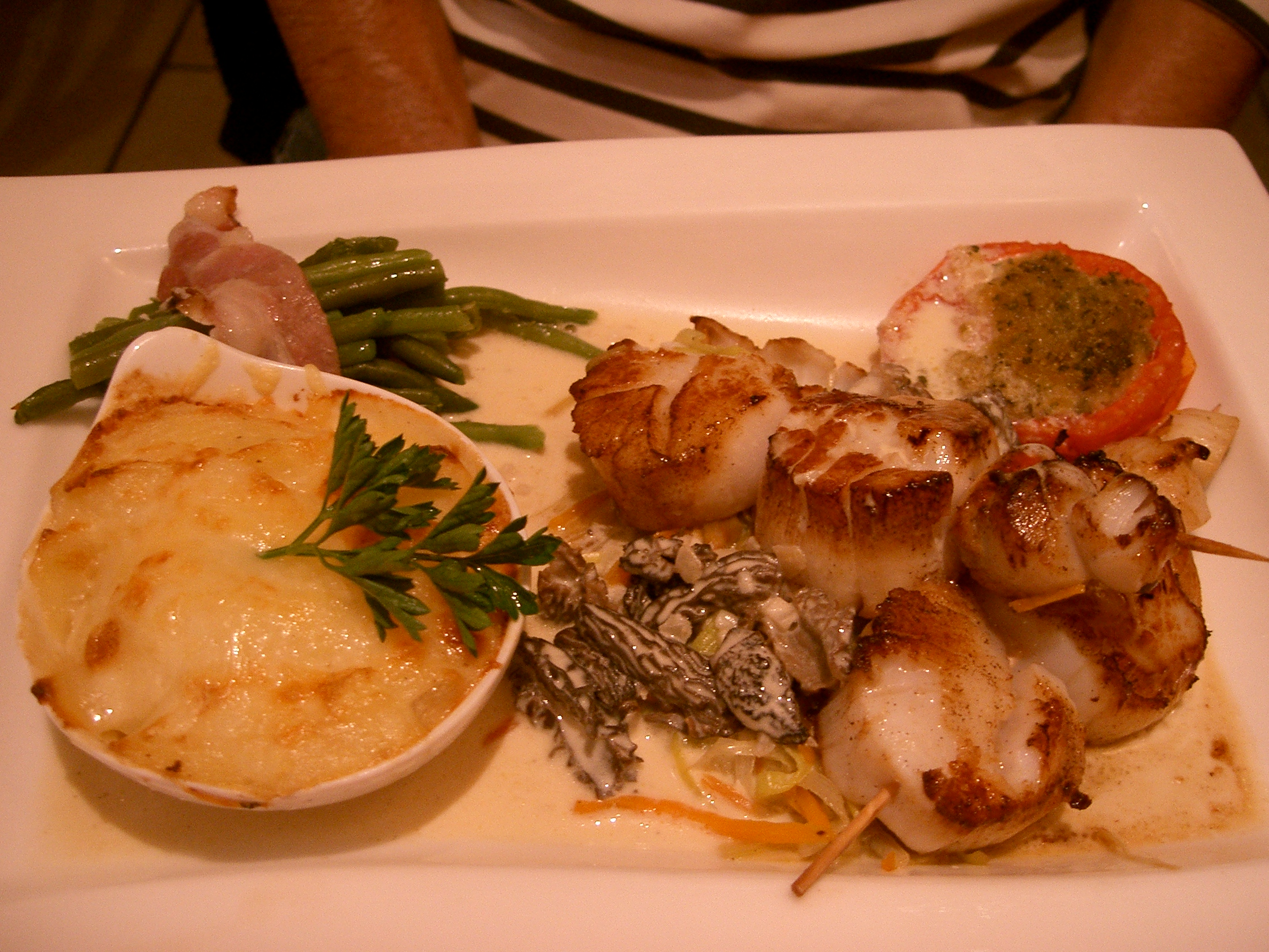 Cuisine française : brochette de coquilles Saint-Jacques aux petits légumes et aux morilles (Franche-Comté)